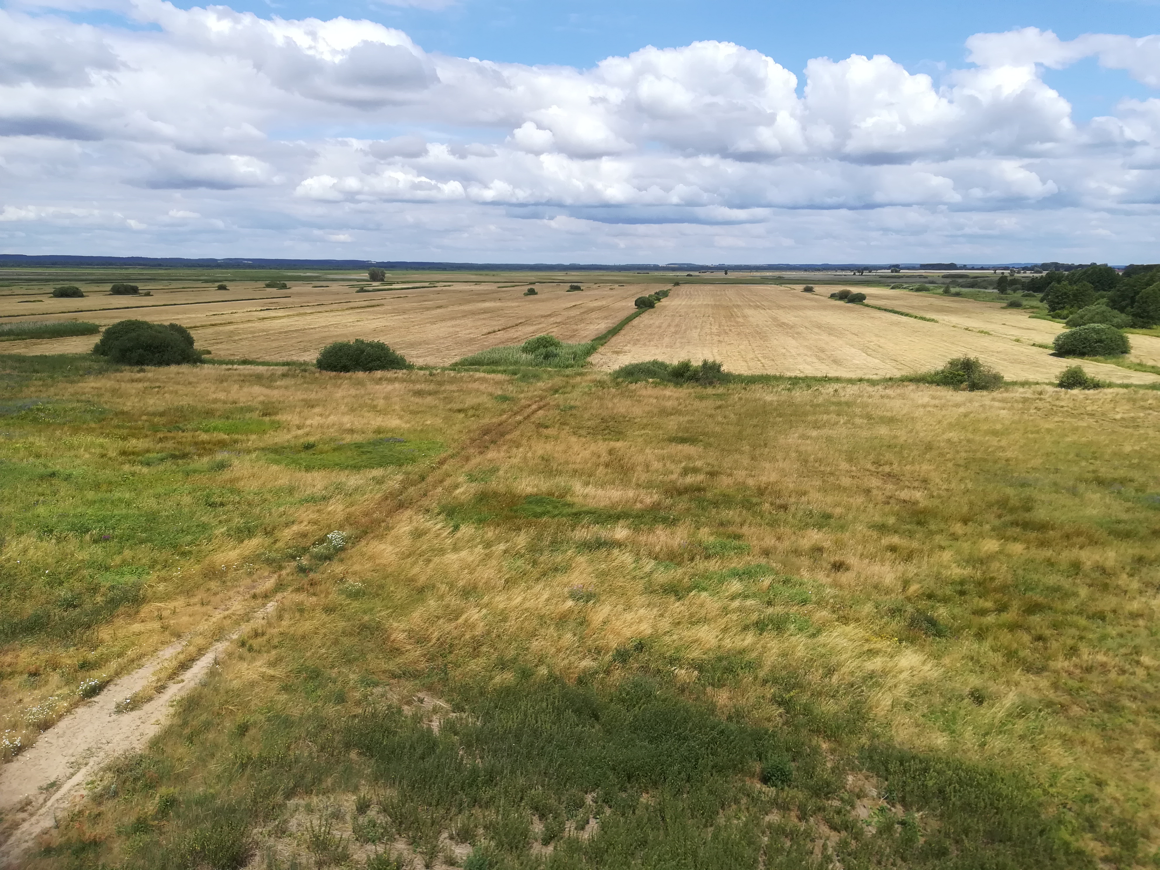 Czarnowska Górka - wydma koło Kostrzyna n/Odrą.